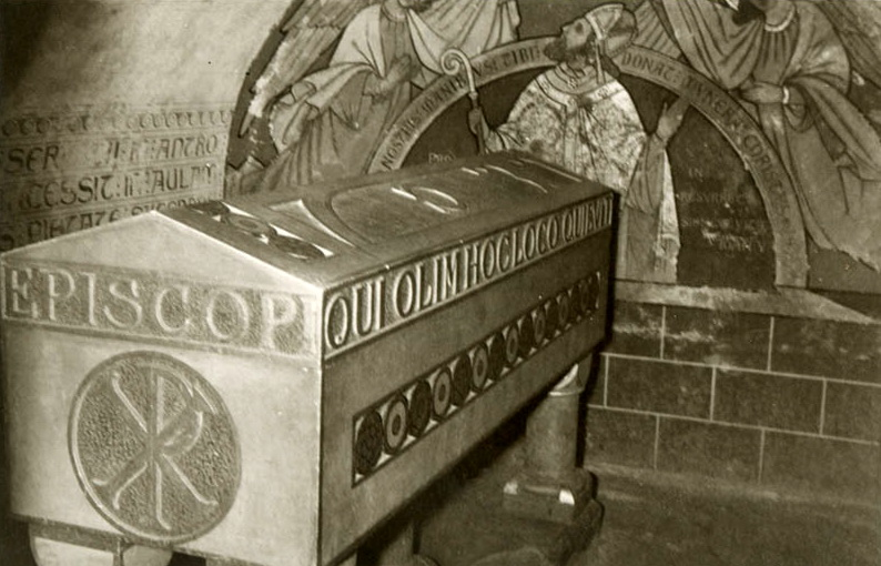 De Sint-Servaascrypte met de neoromaanse graftombe in de Sint-Servaaskerk te Maastricht, zoals die door Cuypers was ingericht. De beschildering bestond onder meer uit zes latijnse versregels naar het zogenaamde oude grafschrift van Servatius. Dit was kort tevoren, in 1881 gepubliceerd door Godefroid Kurth, die dit uit een 8e-eeuws manuscript van de Servaaslegende had gereconstrueerd. Tegen de halfronde achterwand werd deze tekst in een wandschildering uitgebeeld. Servaas gekleed in zijn bisschoppelijk gewaad met pallium, mijter en de bisschopsstaf in zijn rechterhand wordt door twee engelen gekroond met de kroon van het eeuwige leven.